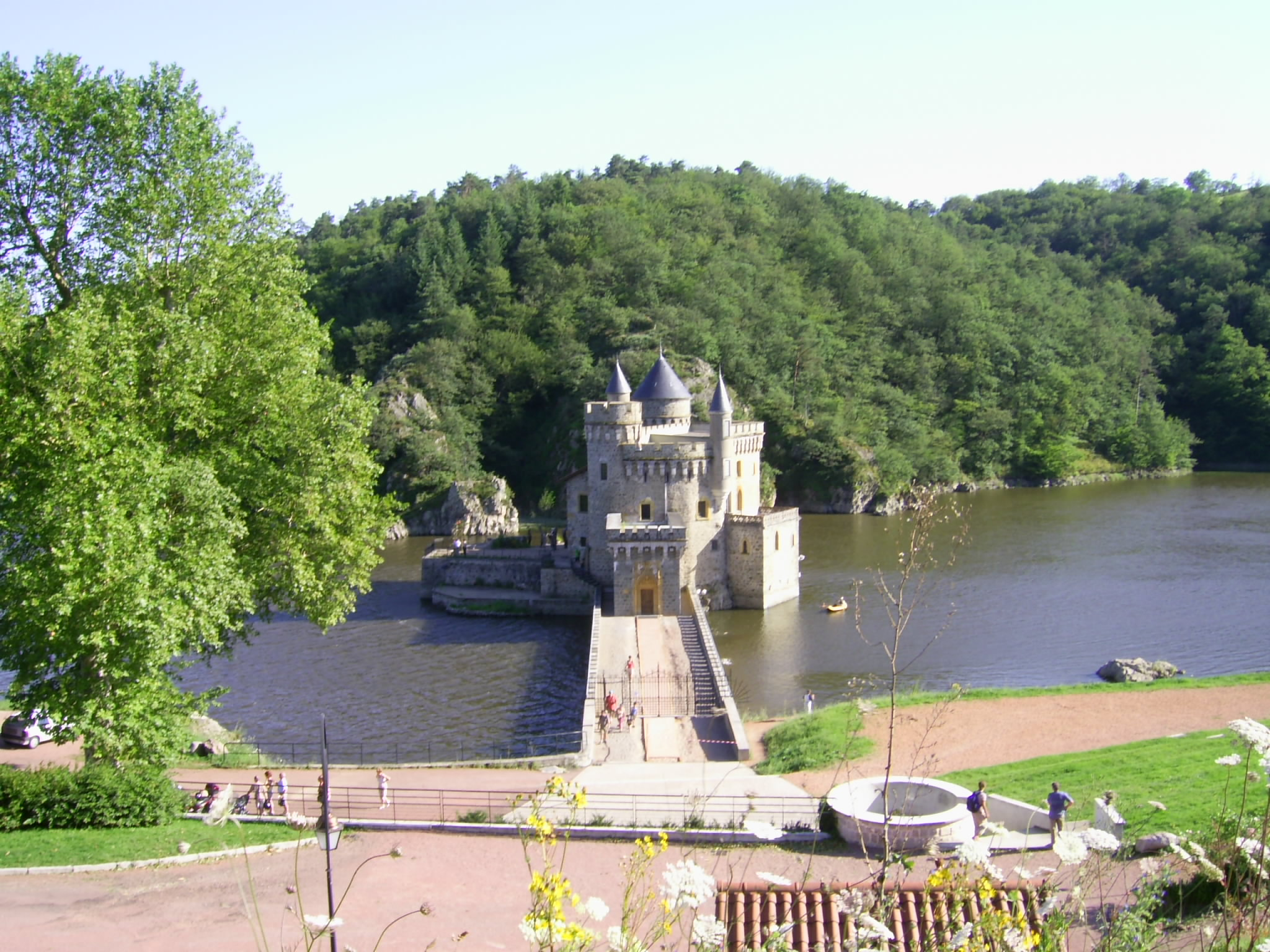 Château de La Roche - Saint Priest la Roche - Loire - France